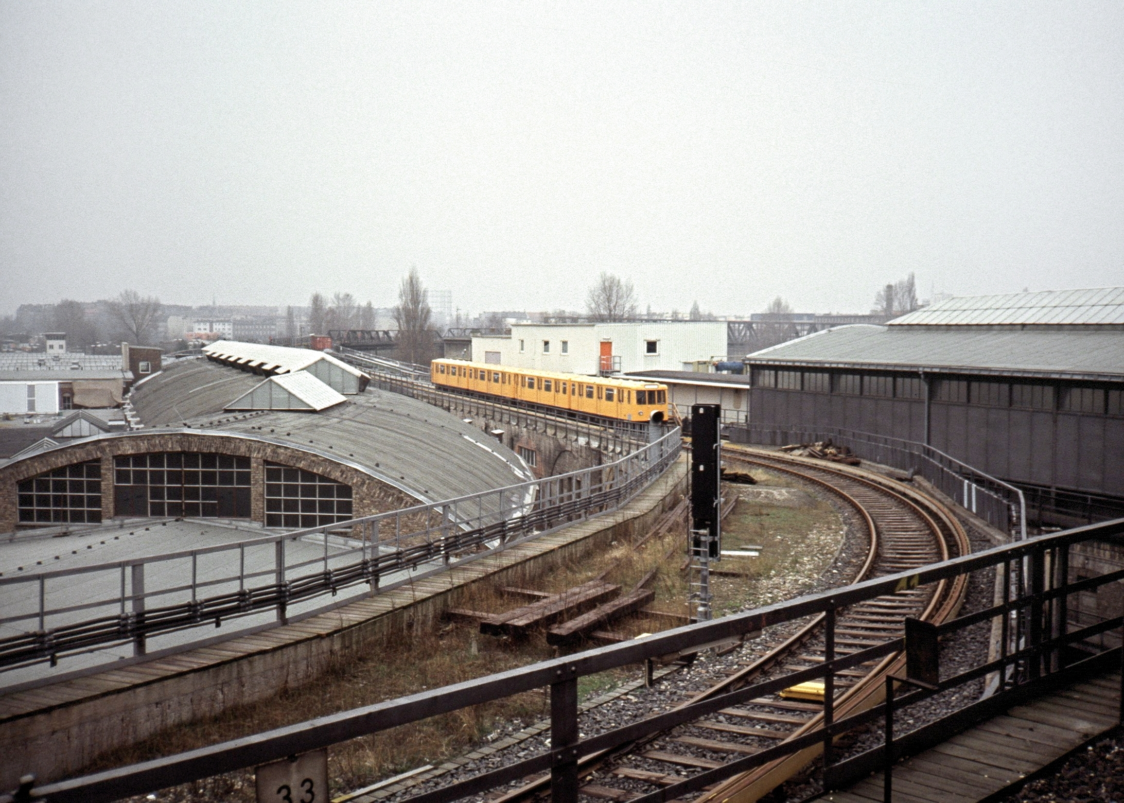 Südliches Verbindungsgleis am U-Bahnhof Gleisdreieck Berlin, rechts die Bahnsteighalle der heutigen U2, Mitte abgestellter AIII-Zug, im Hintergrund die Wagenhalle der M-Bahn, links der Postbahnhof, 1988